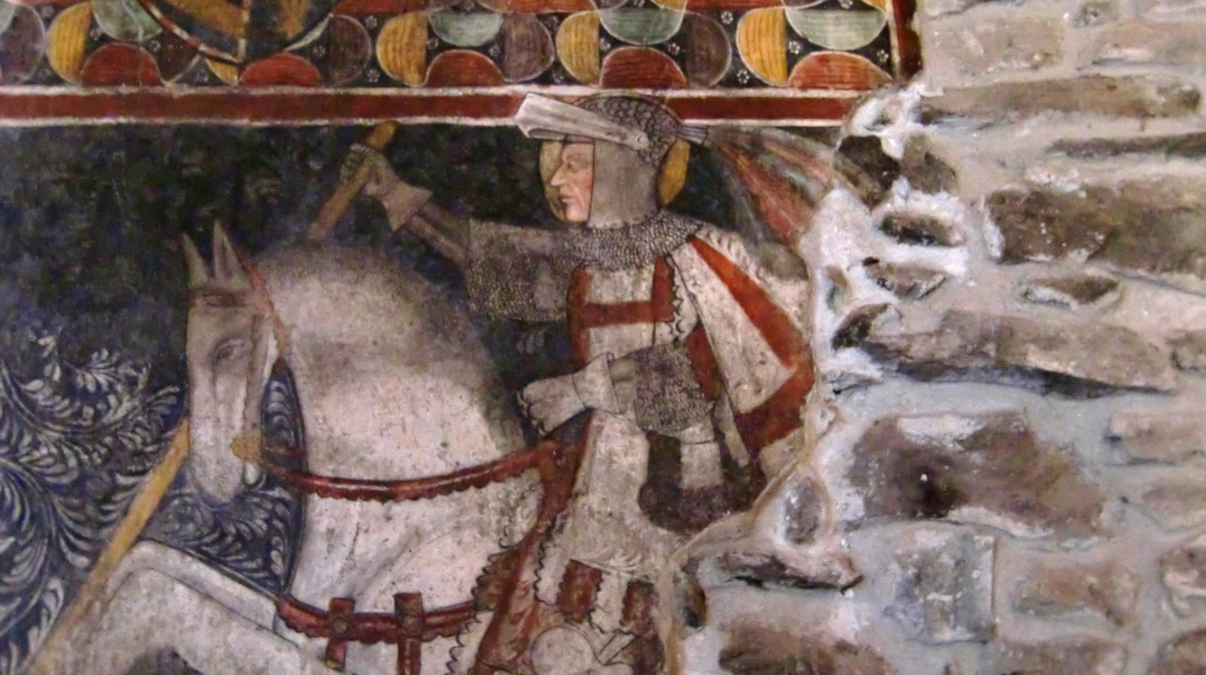 Giacomino da Ivrea, San Giorgio e il drago (particolare), affresco, quarta decade XV secolo, casaforte Saluard, Marseiller (Verrayes)